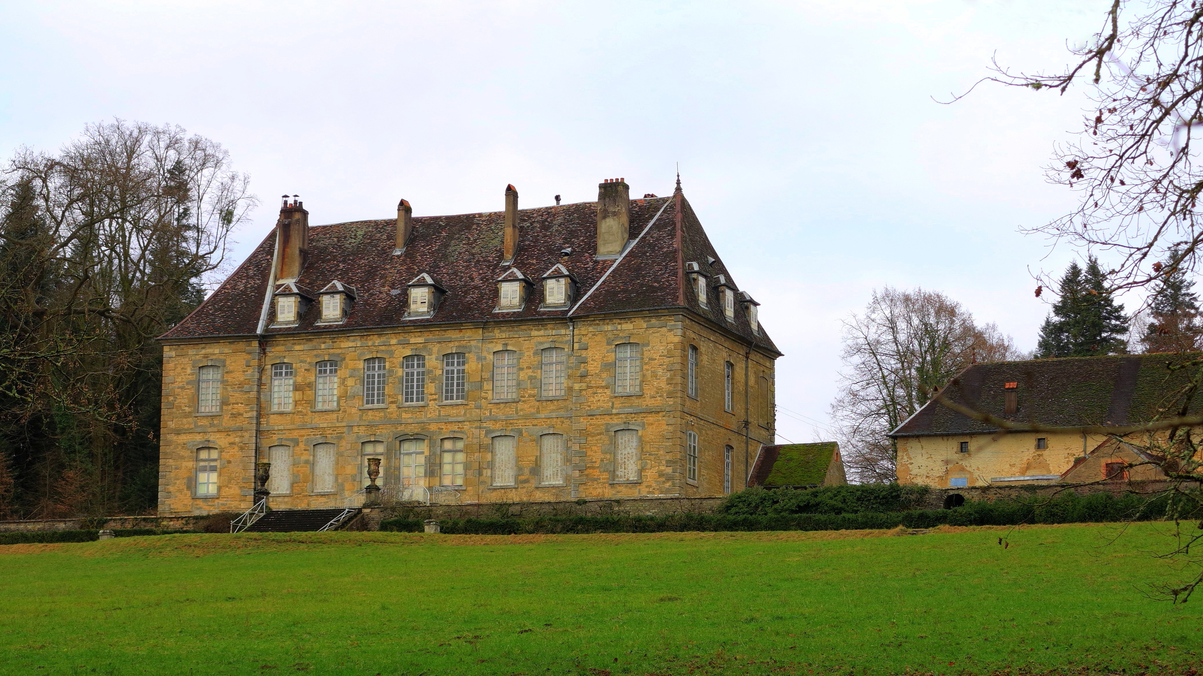 Inscrit aux monuments historiques sous le numéro PA00102330